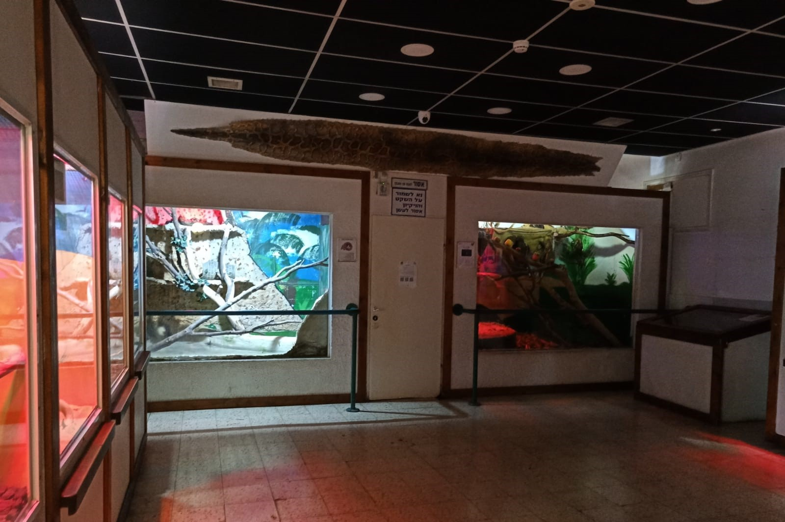 גן החי בפתח תקווה